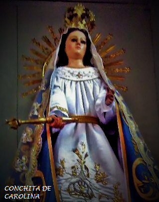 Conchita de Carolina, Imagen de la Virgen, escultura antioqueña